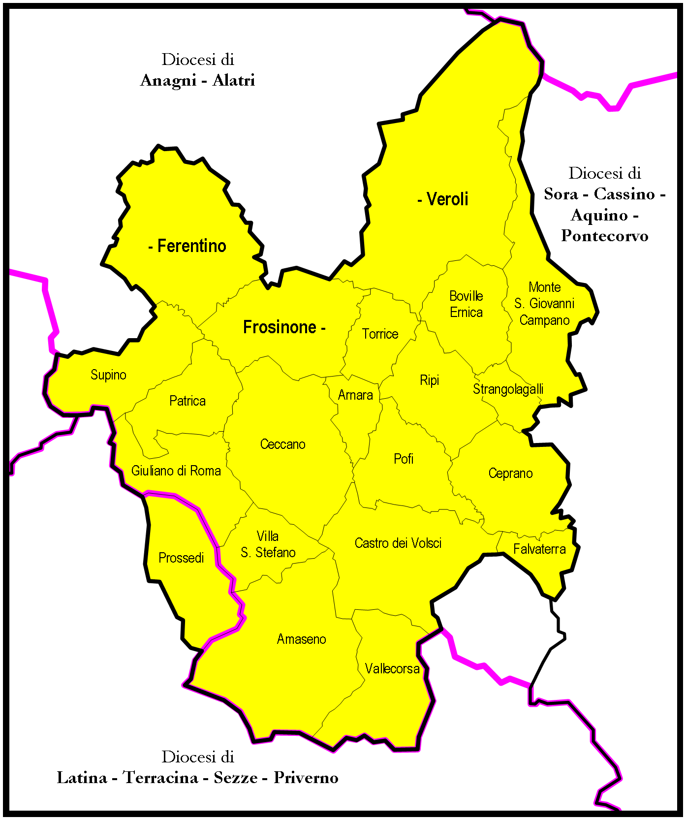 Mappa della Diocesi di Frosinone - Veroli - Ferentino